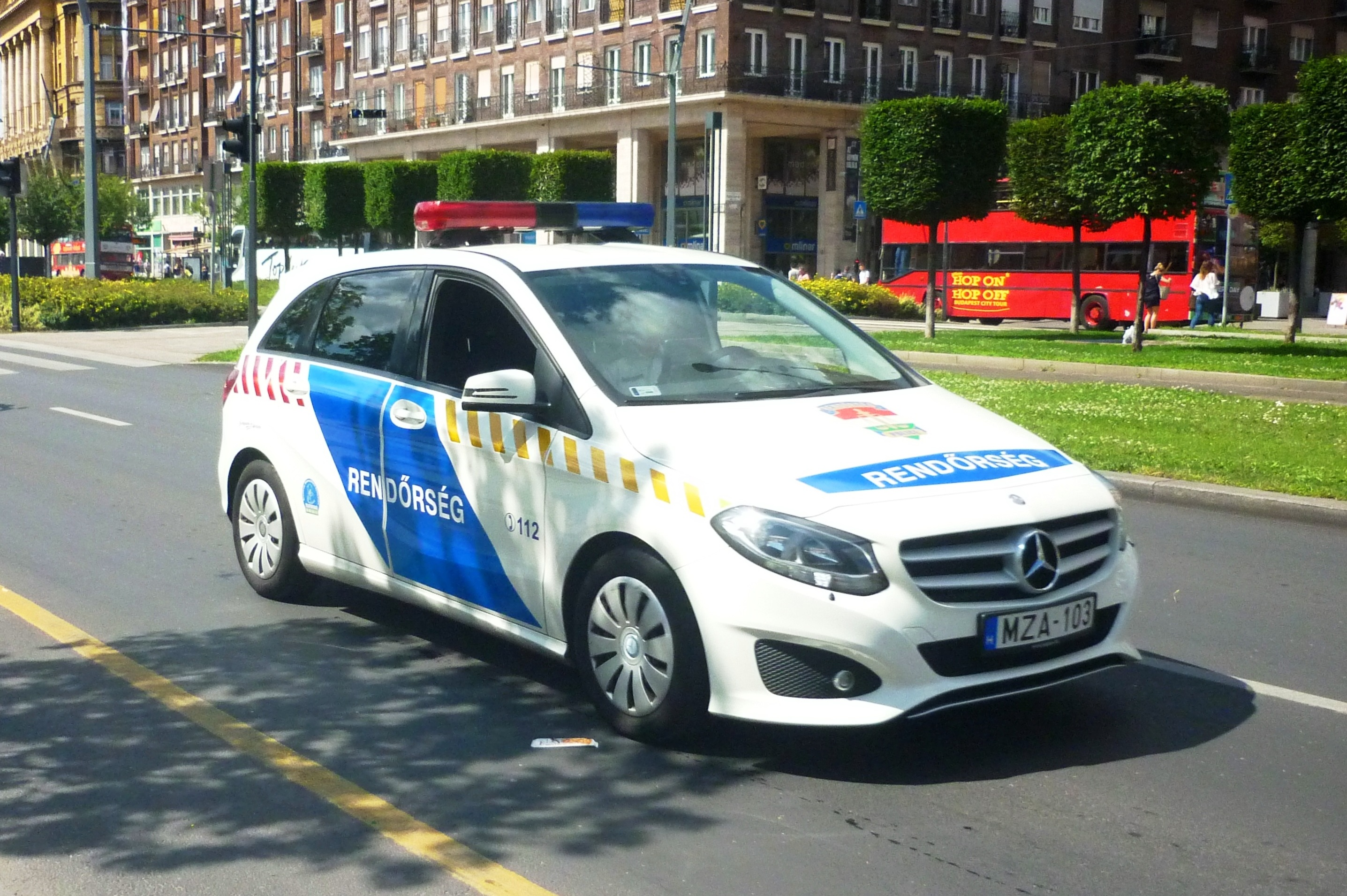 Mercedes-Benz rendőrségi autó (MZA-103), Budapest